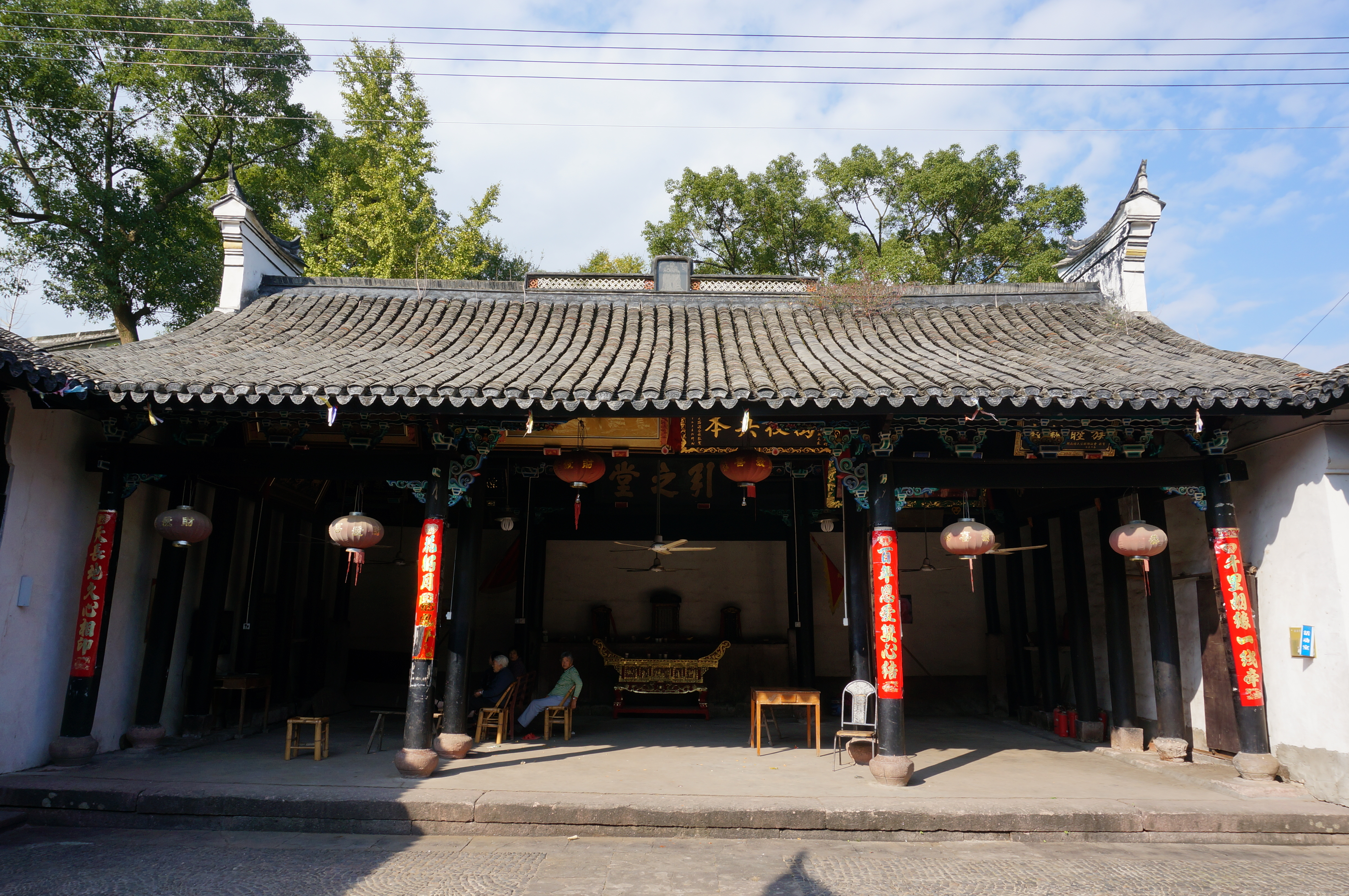 箬岙村褚氏宗祠，享堂，南面。